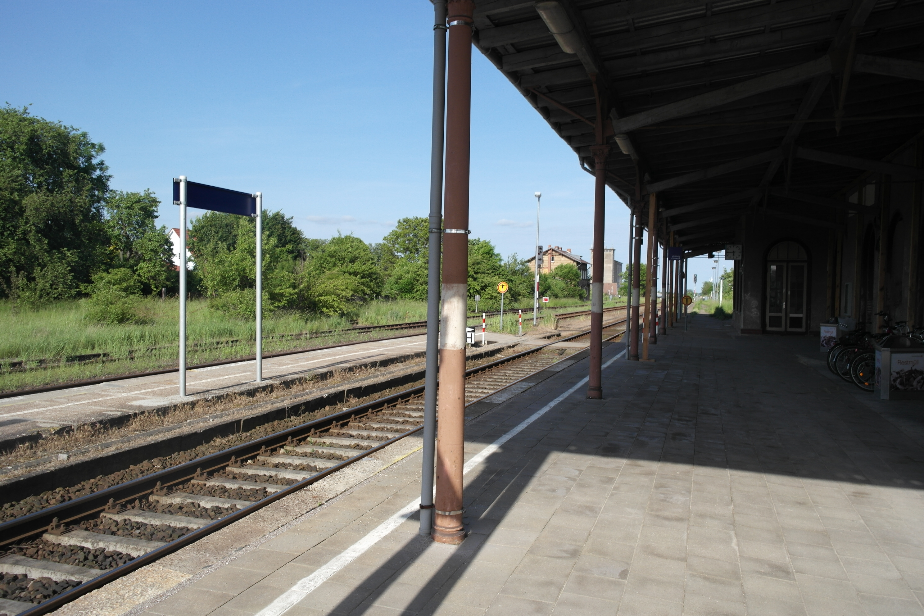 Bahnhof Strasburg, Empfangsgebäude, Bahnsteig